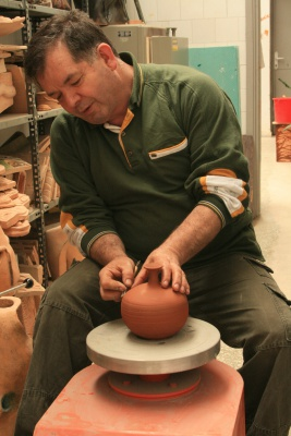 Dr. Şerif Günyar, çömlekçi çarkı'nda.